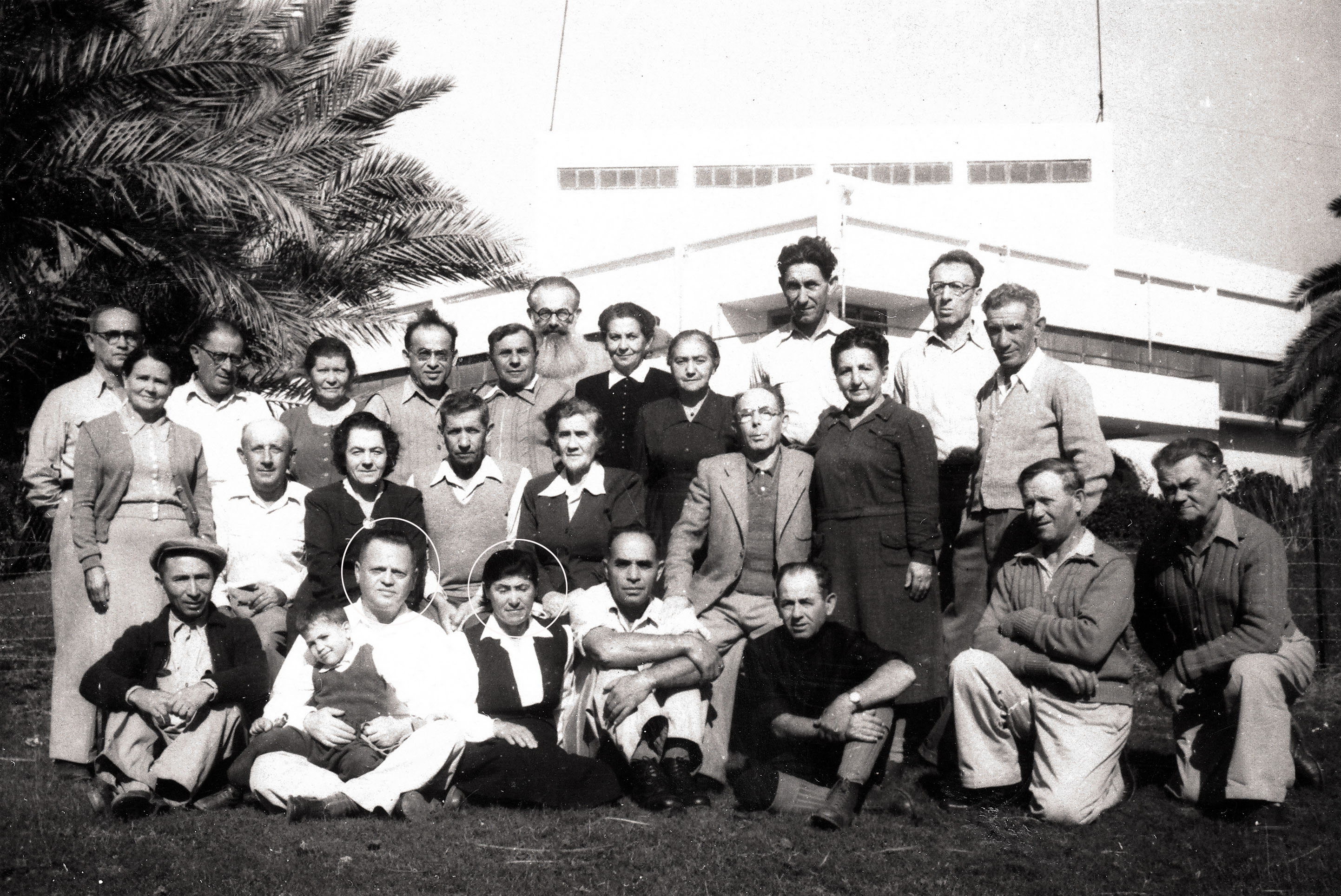 ראשוני תל יוסף במלאות 30 שנה לקיבוץ. יונה וזאב עם הנכד אבנר מסומנים בעיגול. 11.1.1951 תל יוסף